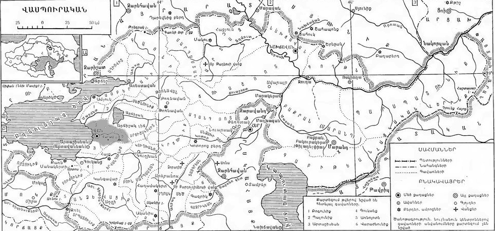 Վասպուրական